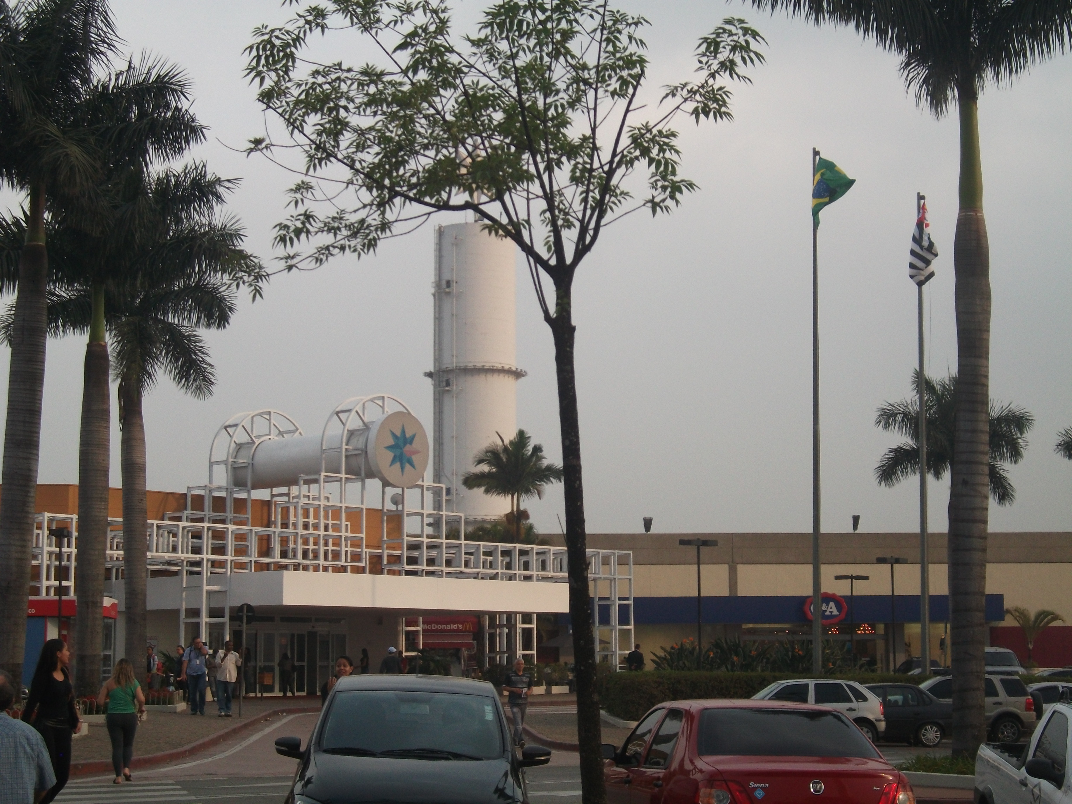 Entrada do Shopping Aricanduva em São Paulo.